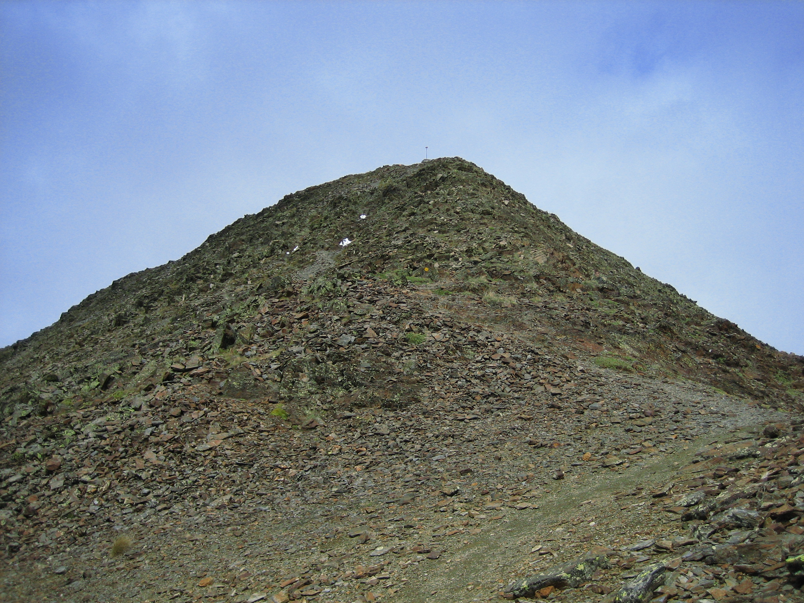 De Pic de Coma Pedrosa, hoogste top van Andorra (Arinsal, La Massana). Eigen werk, PD.